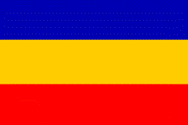 Durant la 2a República Espanyola molts simpatitzants andorrans van utilitzar els colors de la banera andorrana en horitzontal.